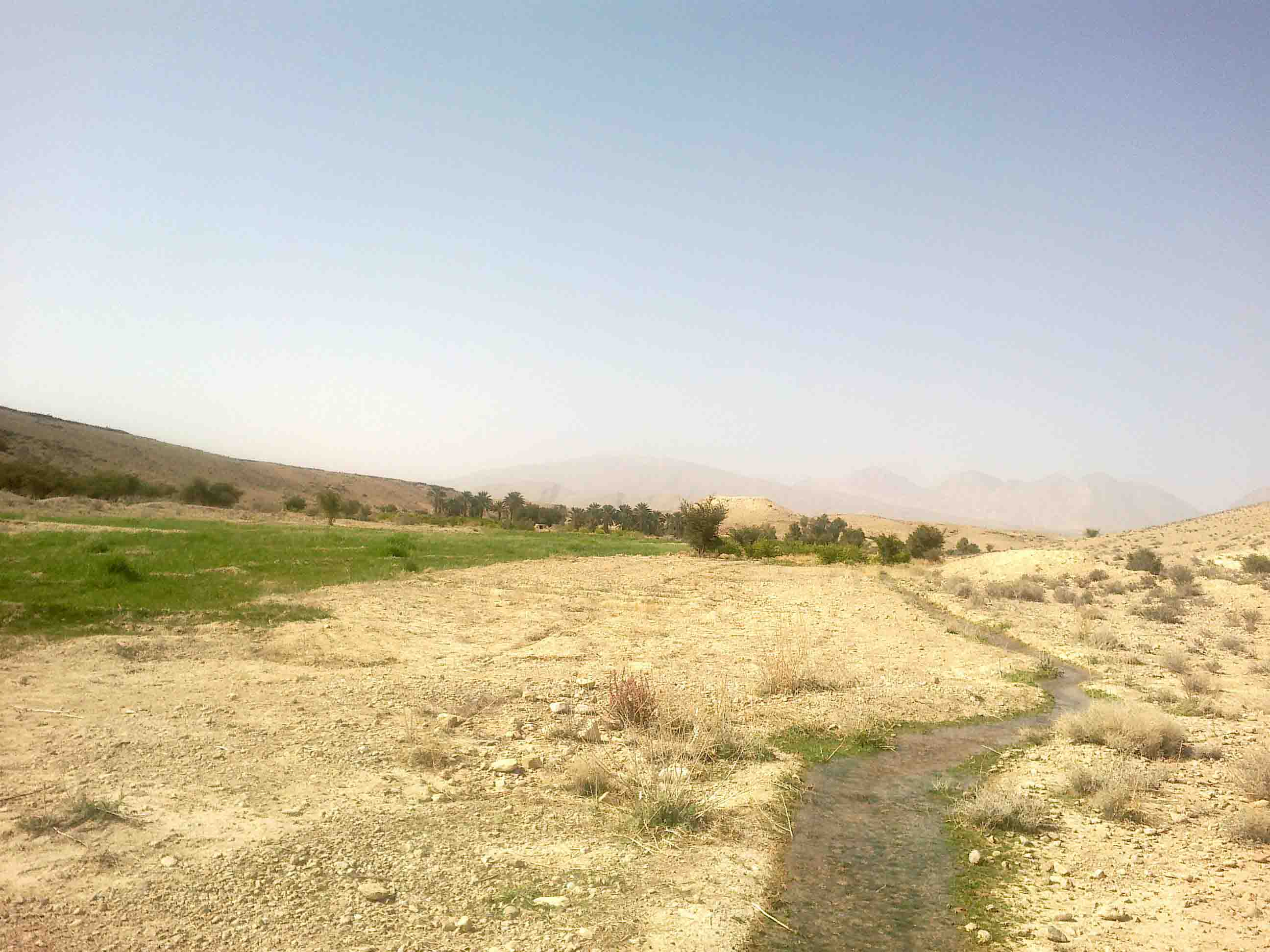 منطقه تفریحی قادر آباد